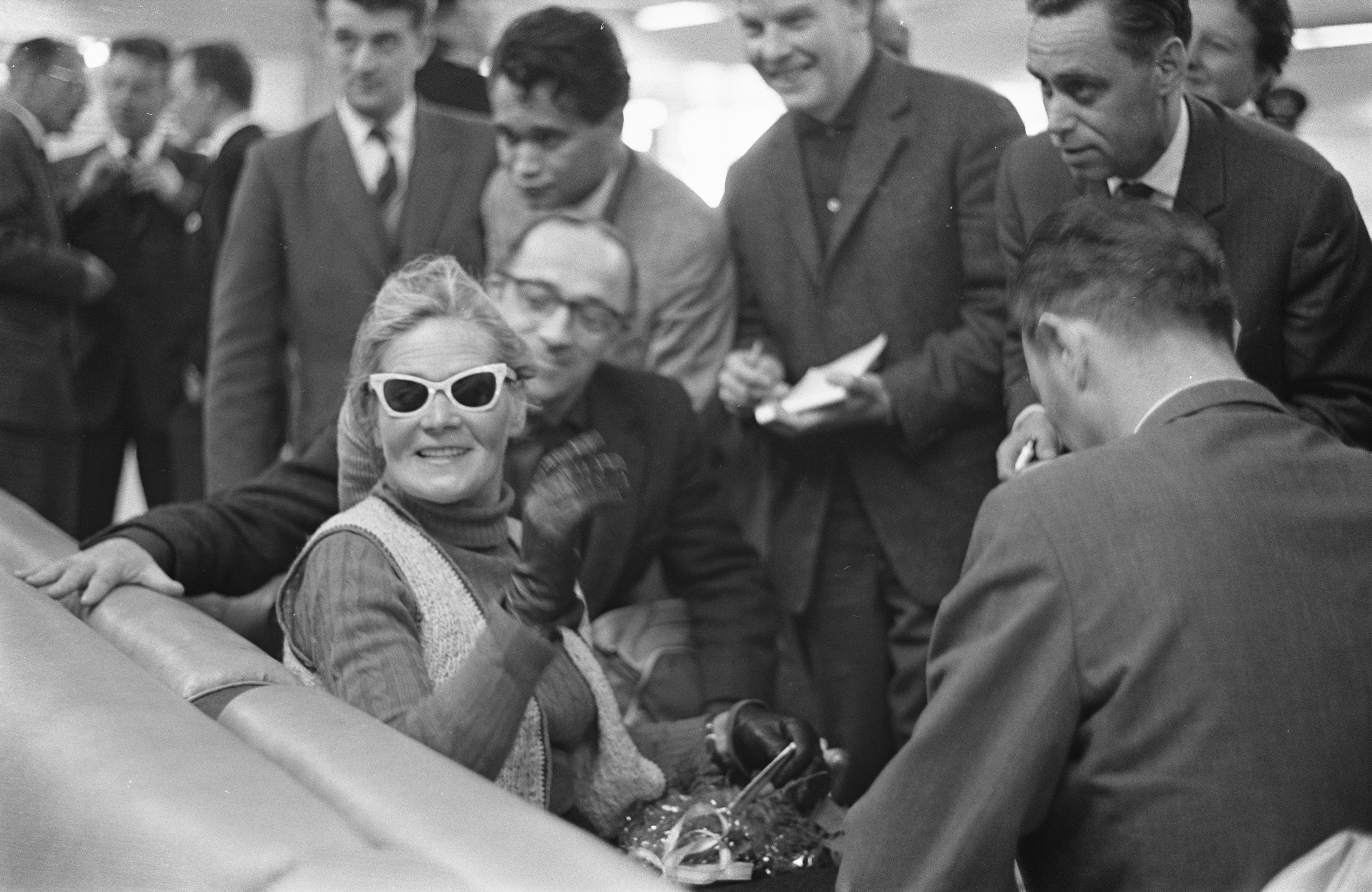 Collectie / Archief : Fotocollectie Anefo Reportage / Serie : [ onbekend ] Beschrijving : Aankomst Britse langeafstand wandelaarster dr. Barbara Moore op Schiphol. Mevrouw Moore staat journalisten te woord Datum : 1 juni 1961 Locatie : Noord-Holland, Schiphol Trefwoorden : aankomsten, journalisten, vliegvelden, wandelaars, wandelsport Persoonsnaam : Moore, Barbara Fotograaf : Rossem, Wim van / Anefo Auteursrechthebbende : Nationaal Archief Materiaalsoort : Negatief (zwart/wit) Nummer archiefinventaris : bekijk toegang 2.24.01.05 Bestanddeelnummer : 912-5463